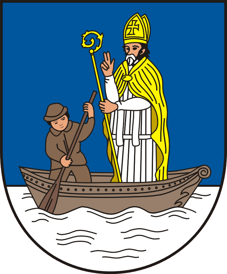 Znak města Husinec (okres Prachatice).